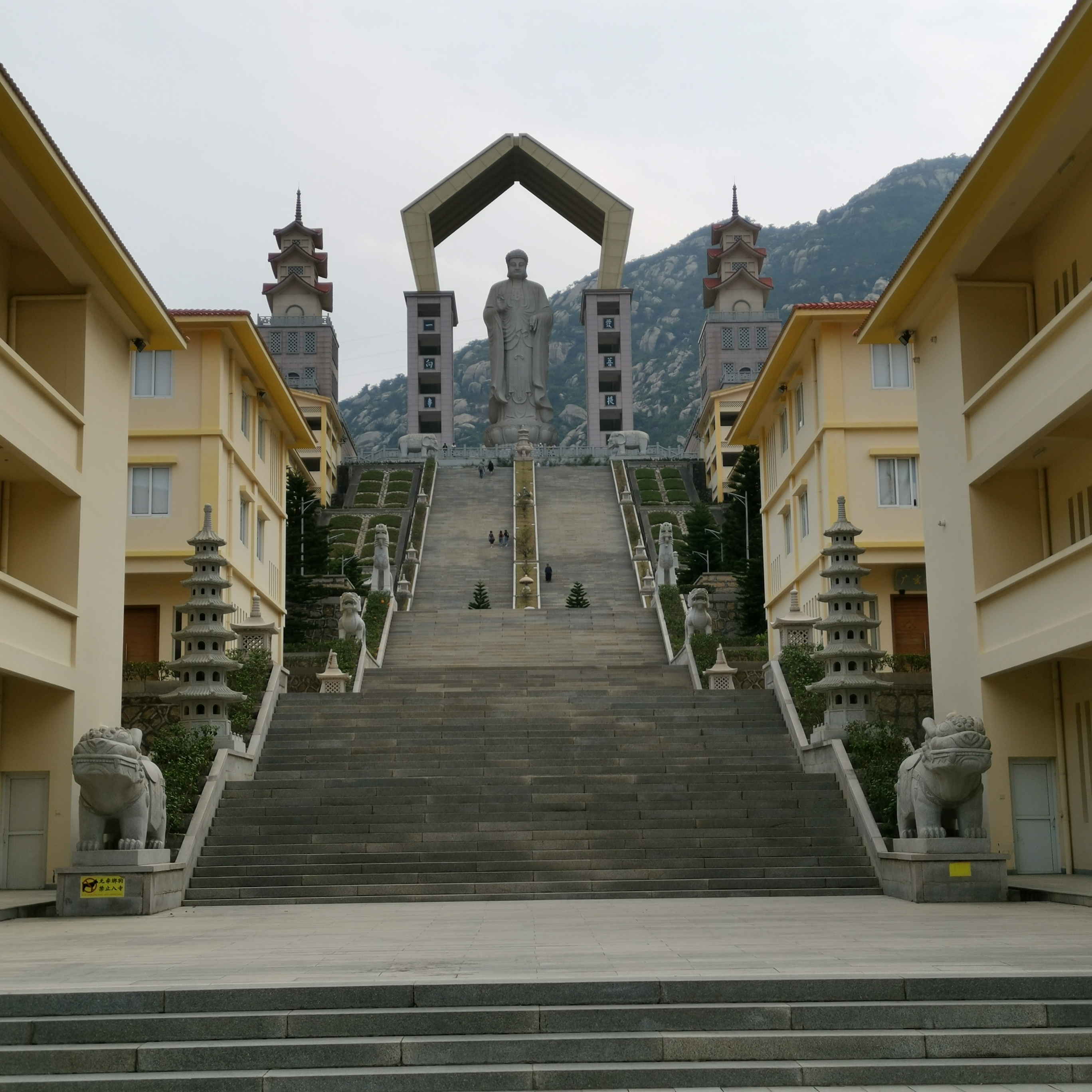 中文（中国大陆）: 卓岐村普照禅寺